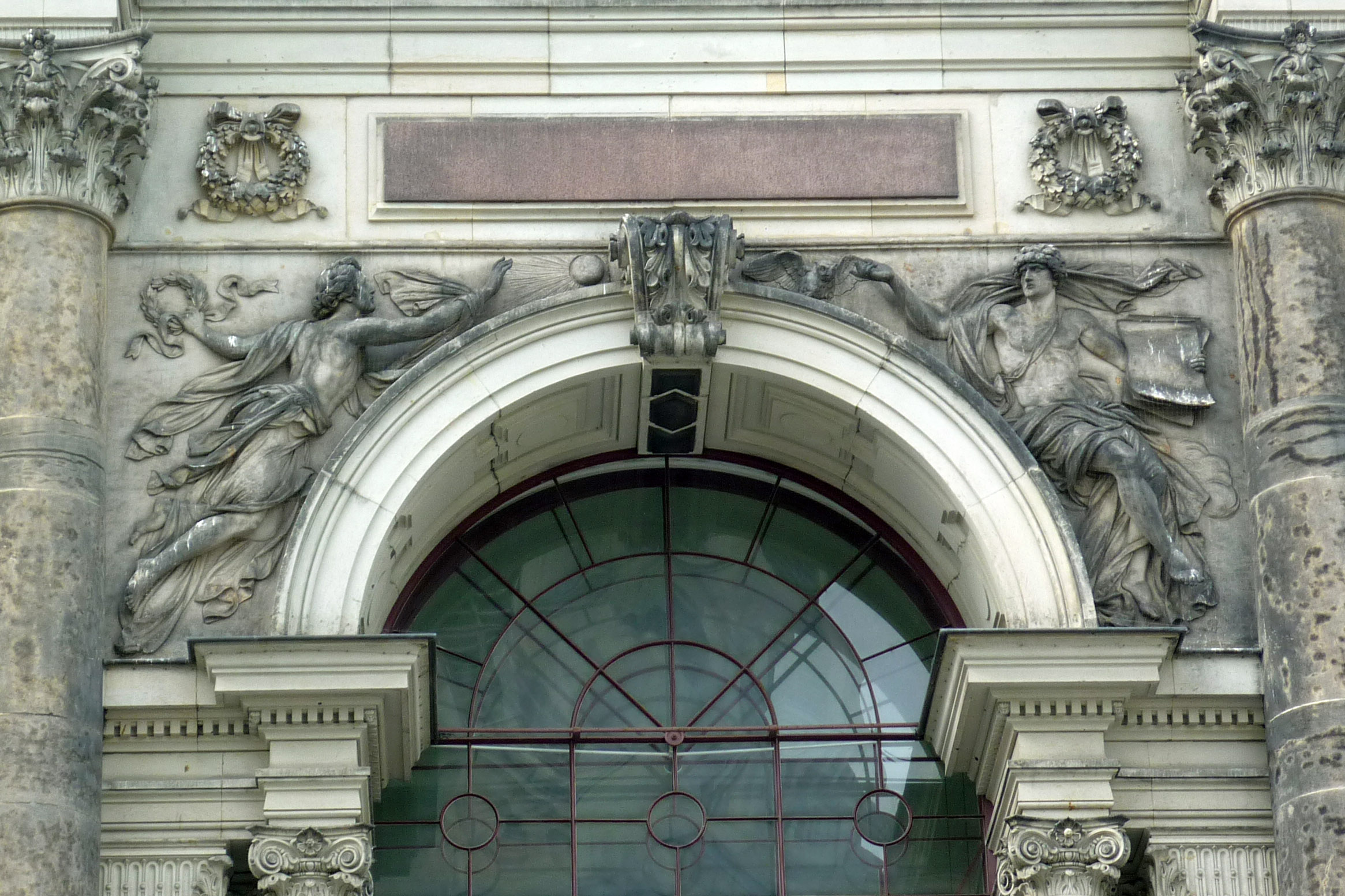 Zwickelfiguren Ehrgeiz (oder Eifer) und Zweifel an der Südfassade der Kunstakademie Dresden von Gustav Broßmann